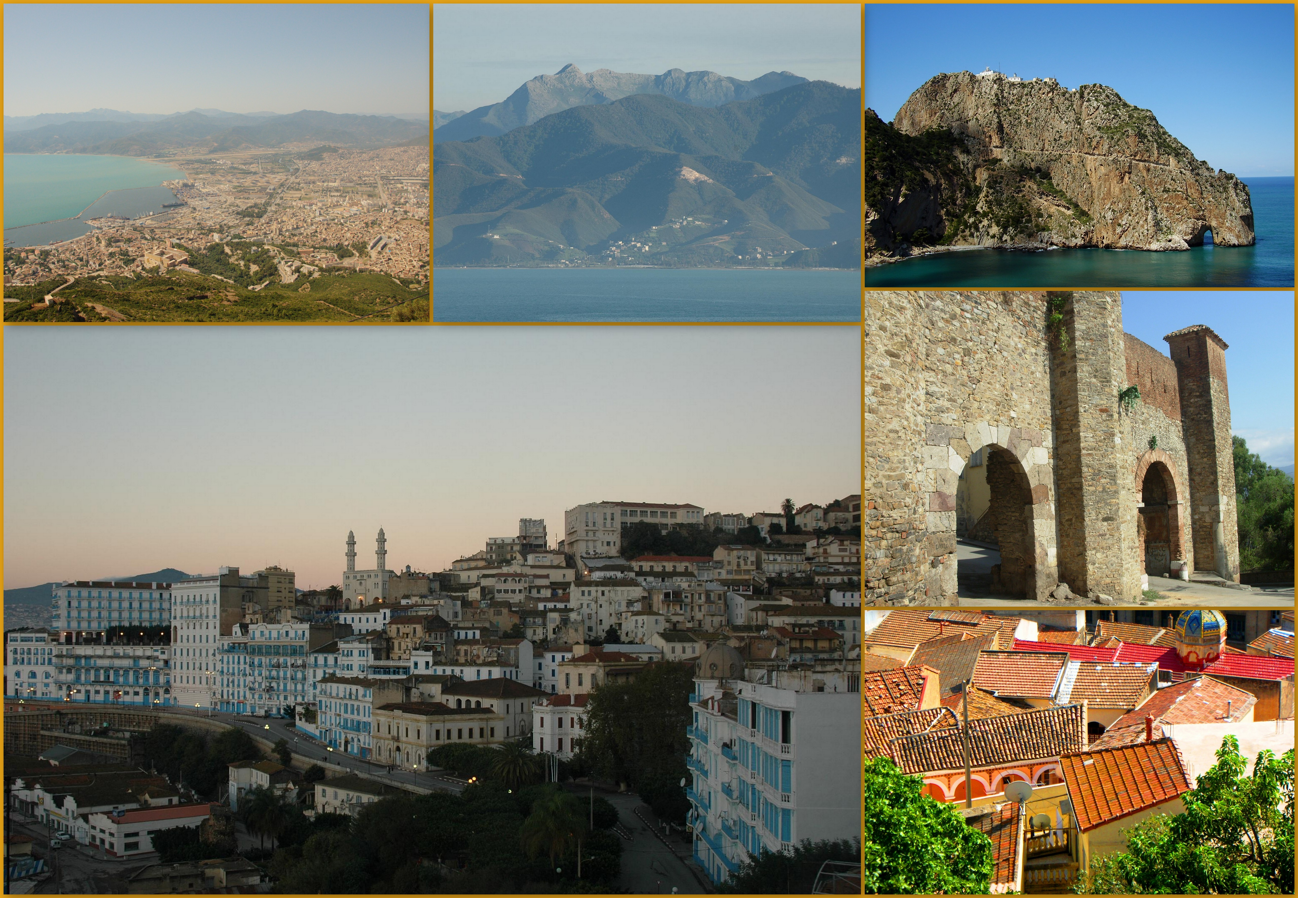 Mosaïque de photos de Béjaïa (Algérie), réalisée sur Picasa (Source : )